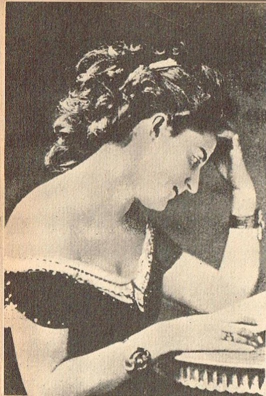 Helene von Dönniges